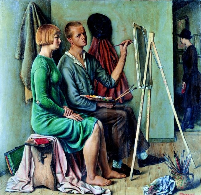 L'Atelierlabel QS:Lfr,"L'Atelier"